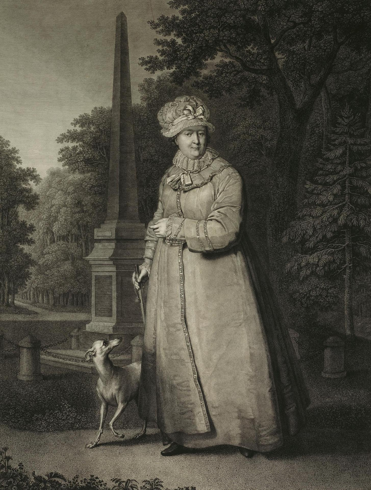 Портрет Екатерины II с оригинала В.Л. Боровиковского. Офорт, резец